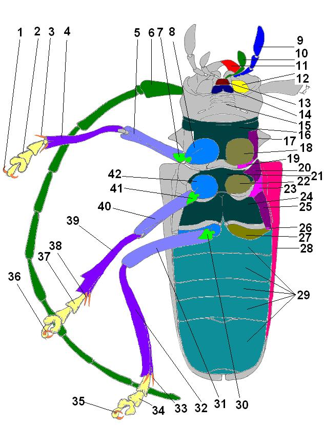 Морфологія вентральної сторони жука-вусача